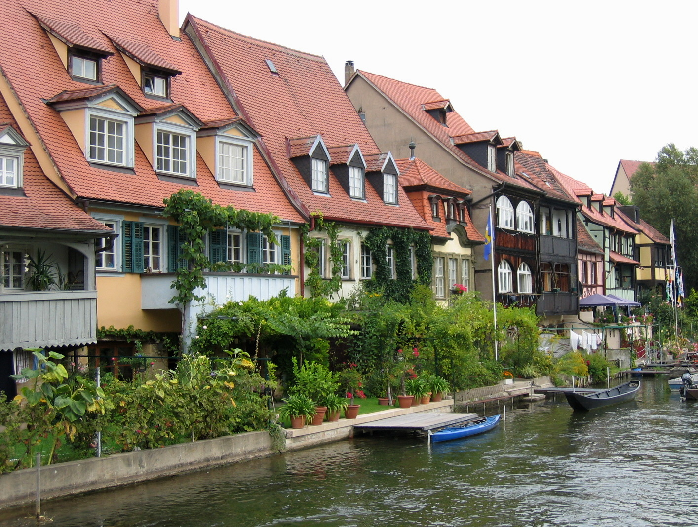 Description: Ehemalige Fischersiedlung in Bamberg (Germany), wird auch "Klein Venedig" genannt. Source: selbst fotografiert Date: 9. Sept. 2005 Author: Asio otus